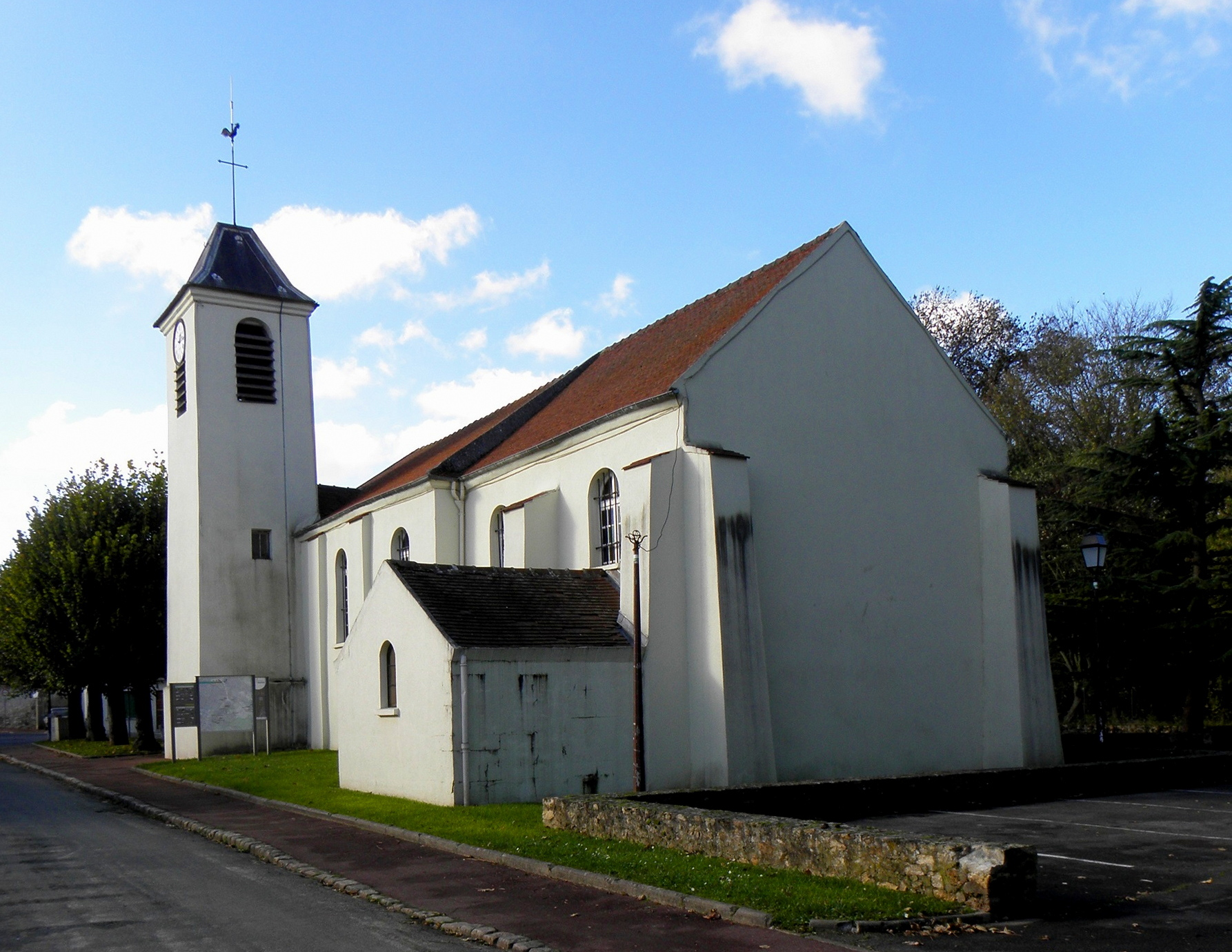 Église Saint-Jacques-le-Mineur et Saint-Philippe de Noiseau (94).